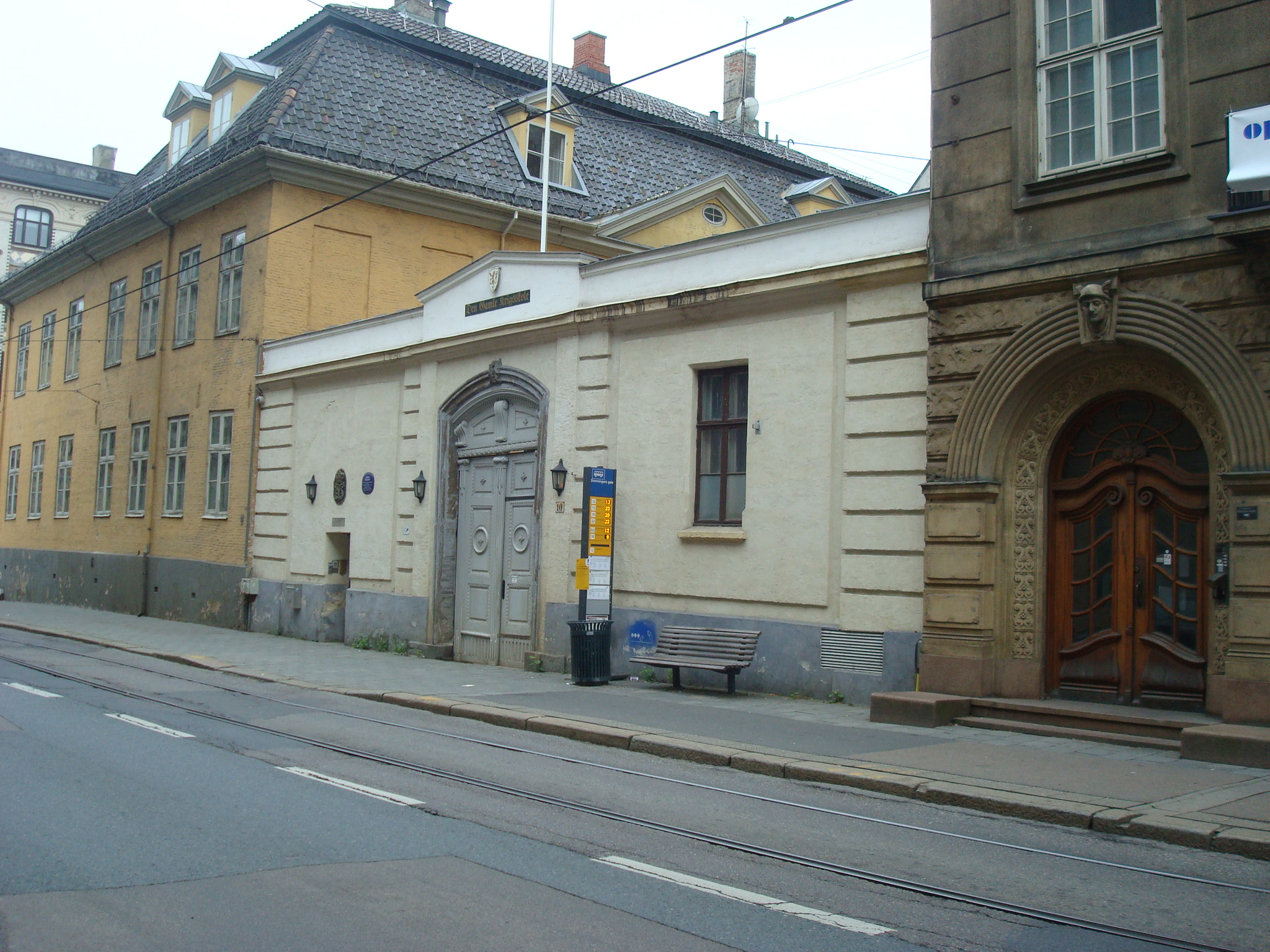 Dronningens gate trikkeholdeplass i Oslo.